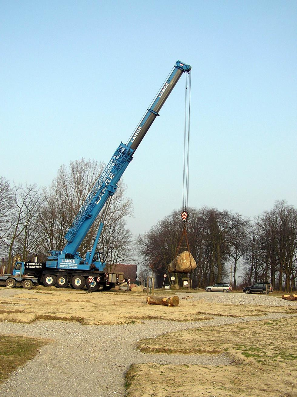 Im Jahre 2006 entstand der Findlingsgarten in Zitterpenningshagen. Hier ein Bild vom Aufbau des Gartens.